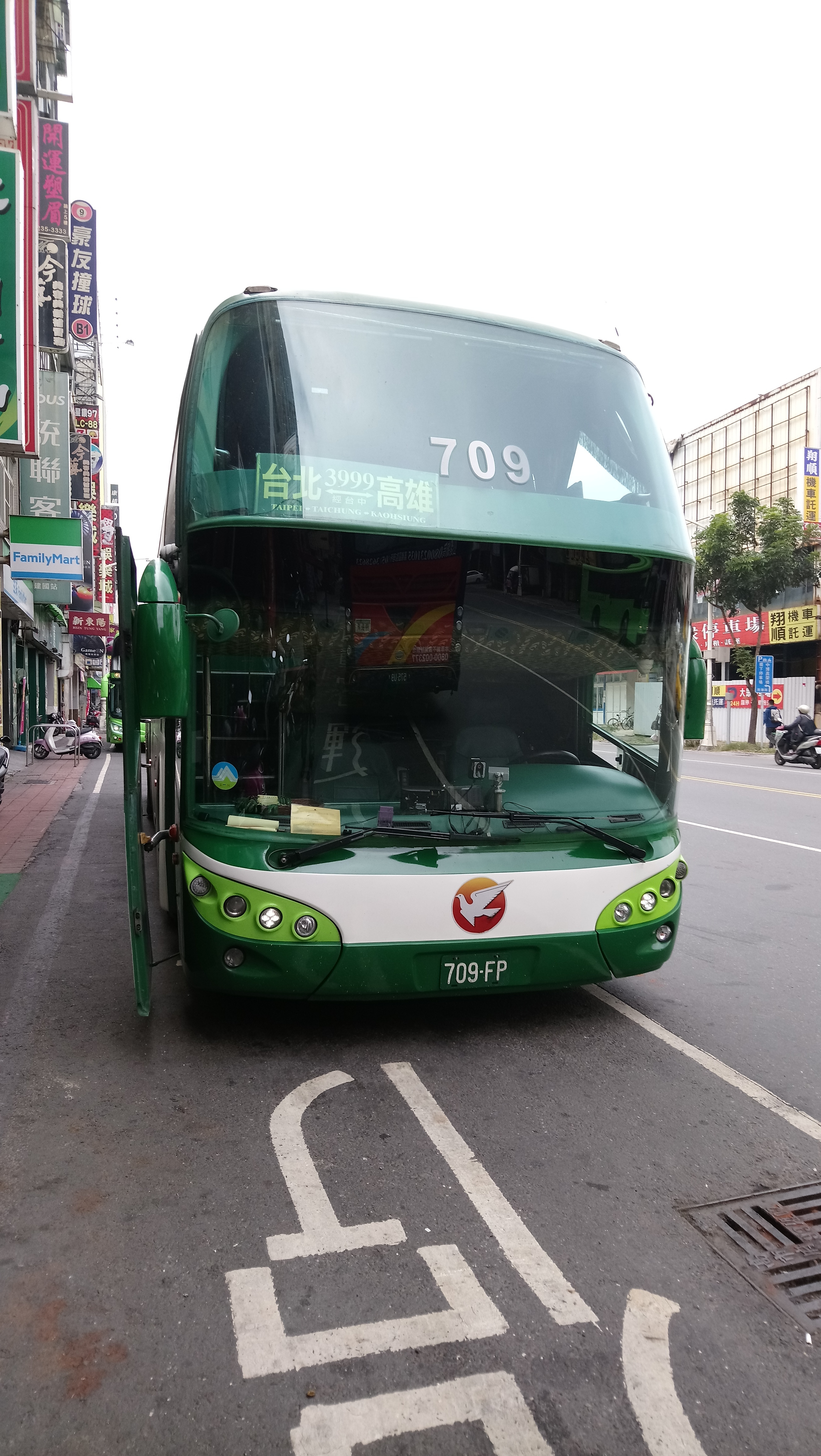 阿羅哈客運SCANIA K380IB4X2NB 709-FP